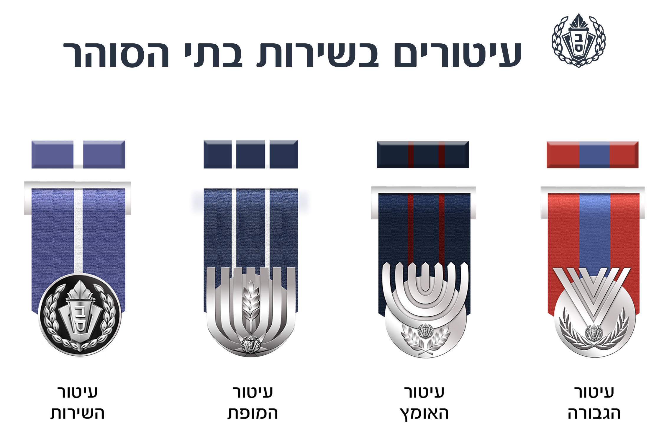 עיטורים בשירות בתי הסוהר